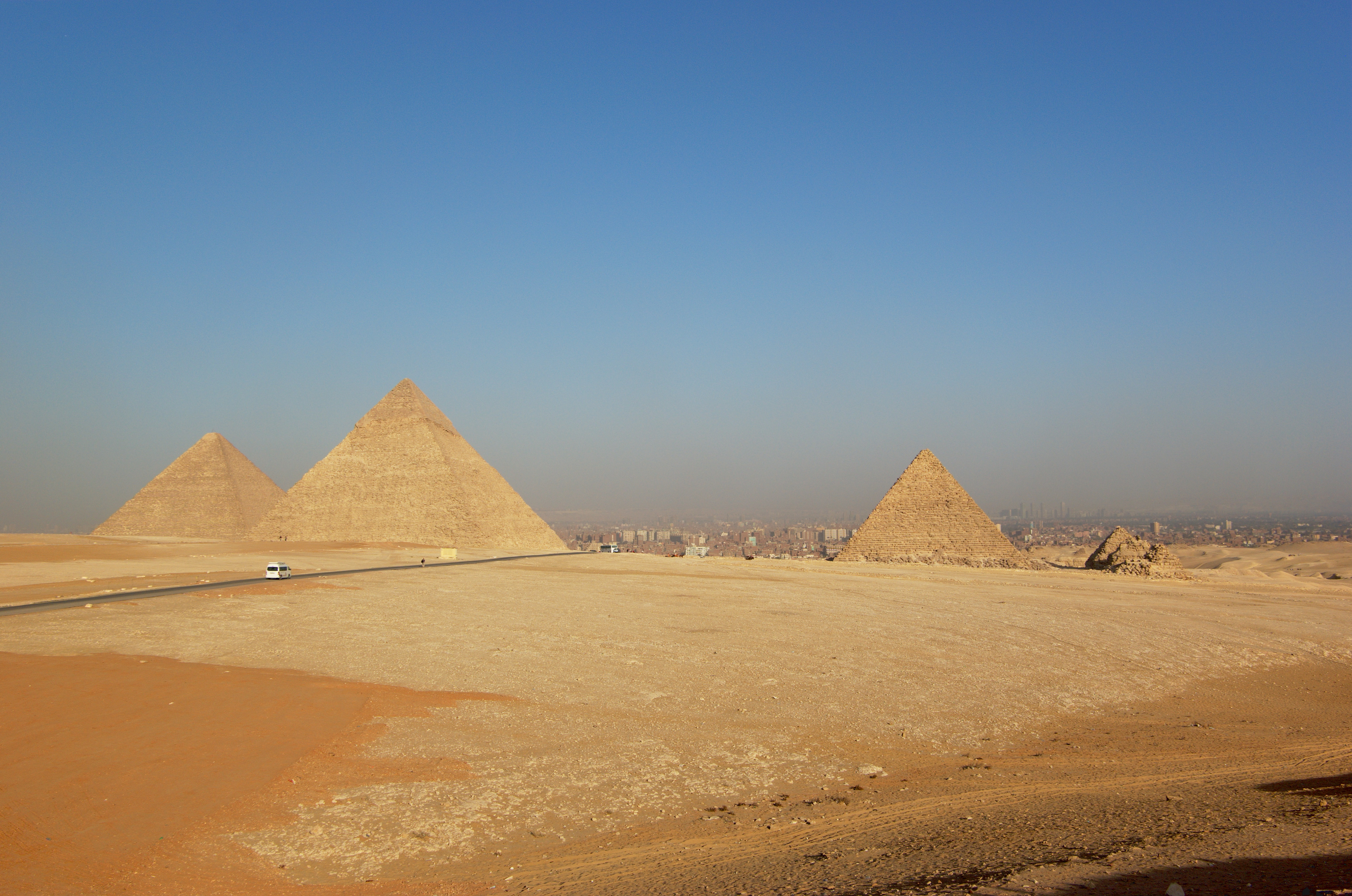 Gizeh, Cheops, Chepren und Mykerinos Pyramide